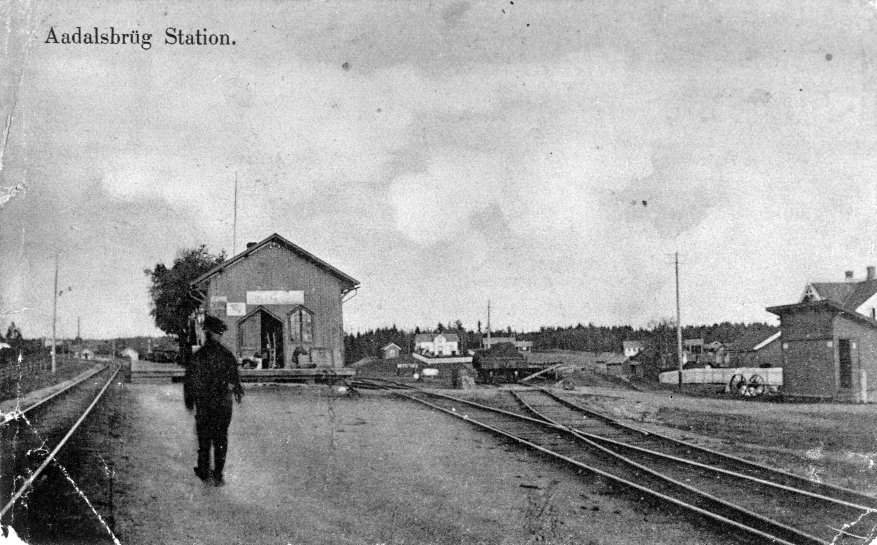 Ådalsbruk stasjon i 1910. Tekst i Digitalt museum: «AADALSBRUG STATION (etablert som Løken stasjon, Grundsetbanen), ÅDALSBRUK JERNBANESTASJON, MANN PÅ PERRONGEN, PAKKHUS I BAKGRUNNEN (samme type arkitektur som direktørbolig, ingeniørbolig og kontorbygning for Aadals Brug). POSTKORT. Sidespor til Aadals Brug jernstøberi og Klevfos. Se Lautin 1976 side 99. Løten.» Fra Domkirkeoddens fotoarkiv. Inventarnummer: 0415-00007